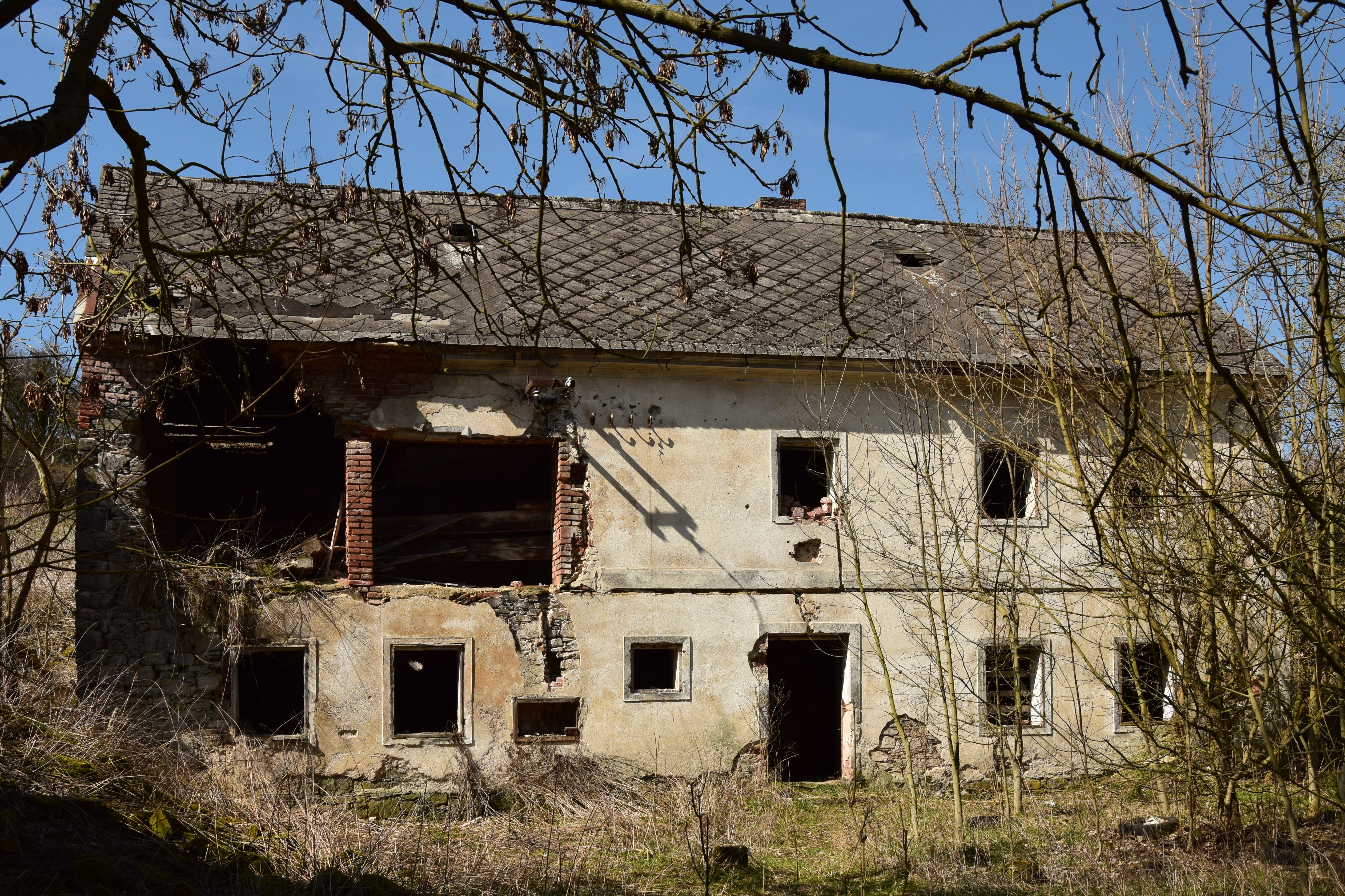 Zvoníčkov – poslední dům